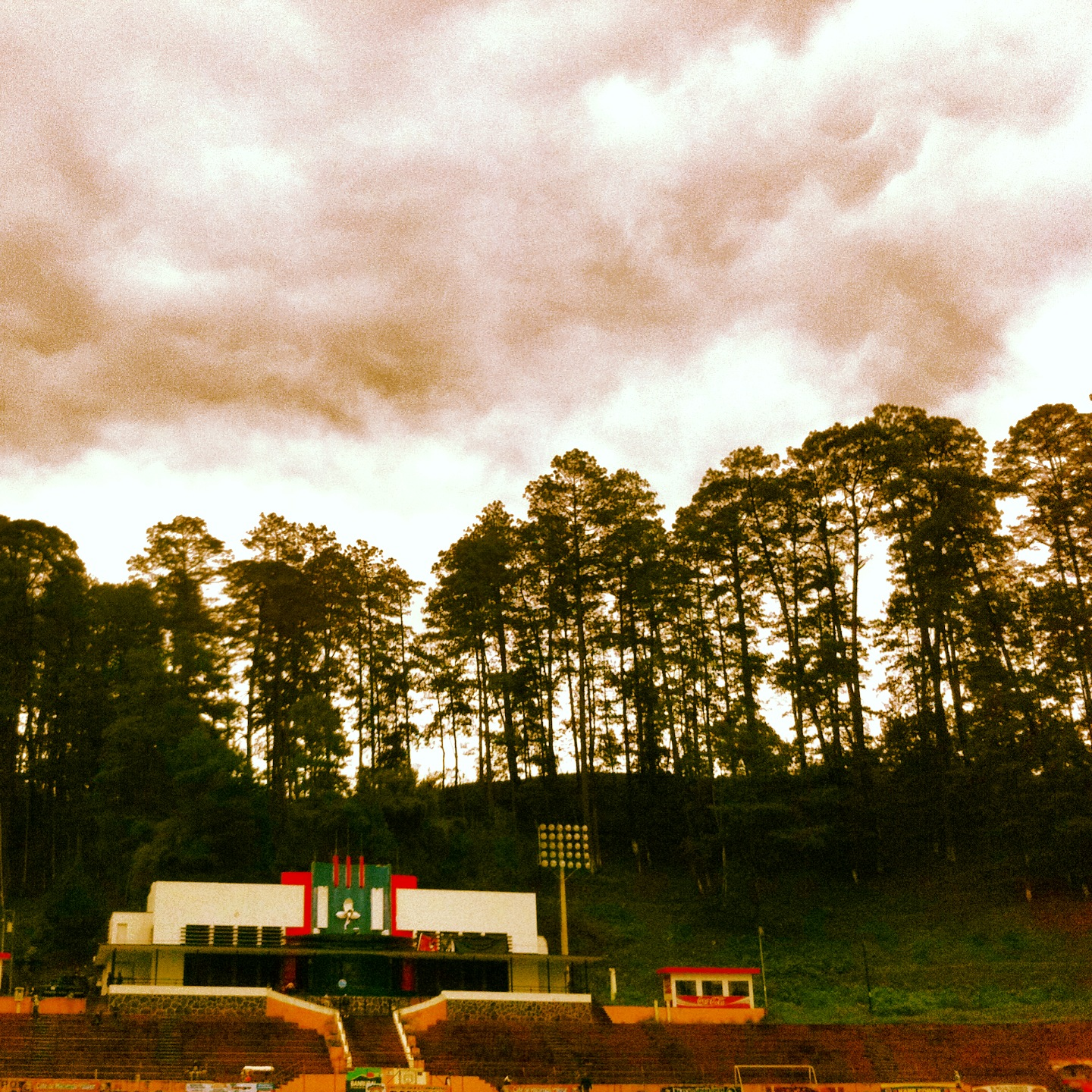 Tribuna y pinos que rodean al Estadio Verapaz.